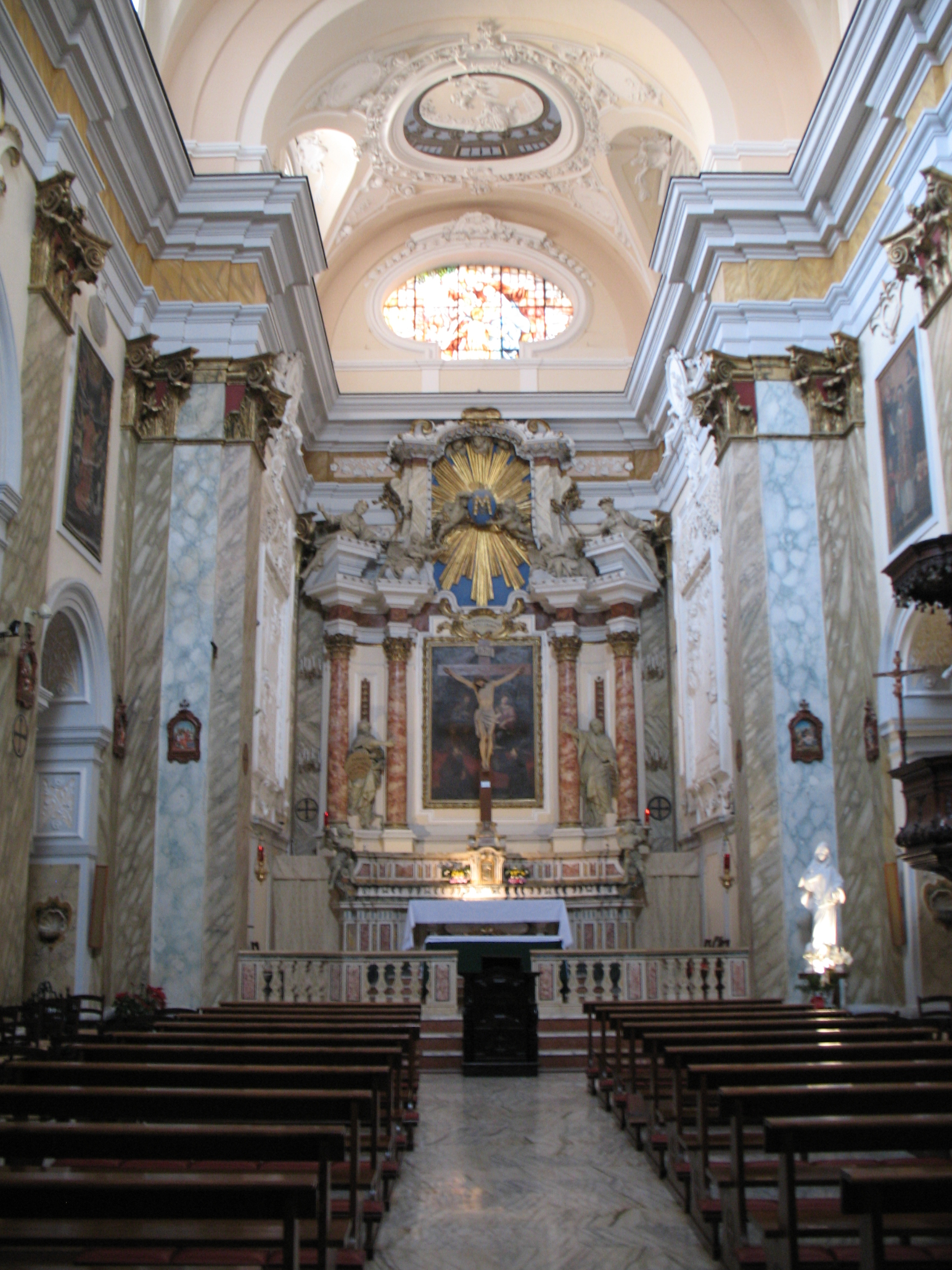 Interno della Chiesa di San Domenico